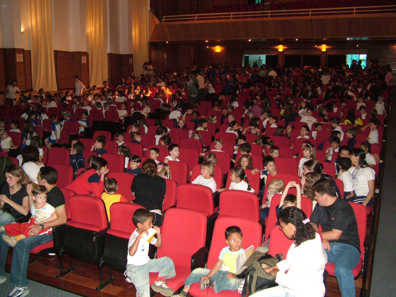 Teatro, Ponta Grossa, Brazil